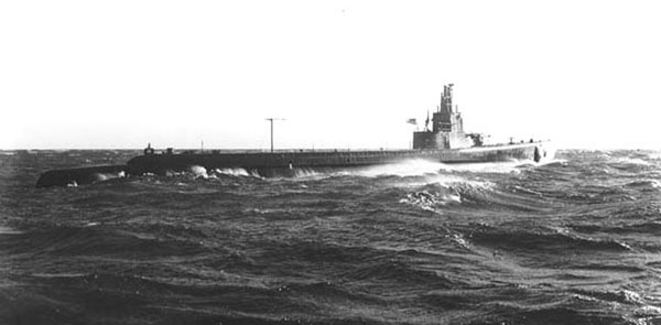 USS Golet (SS-361)